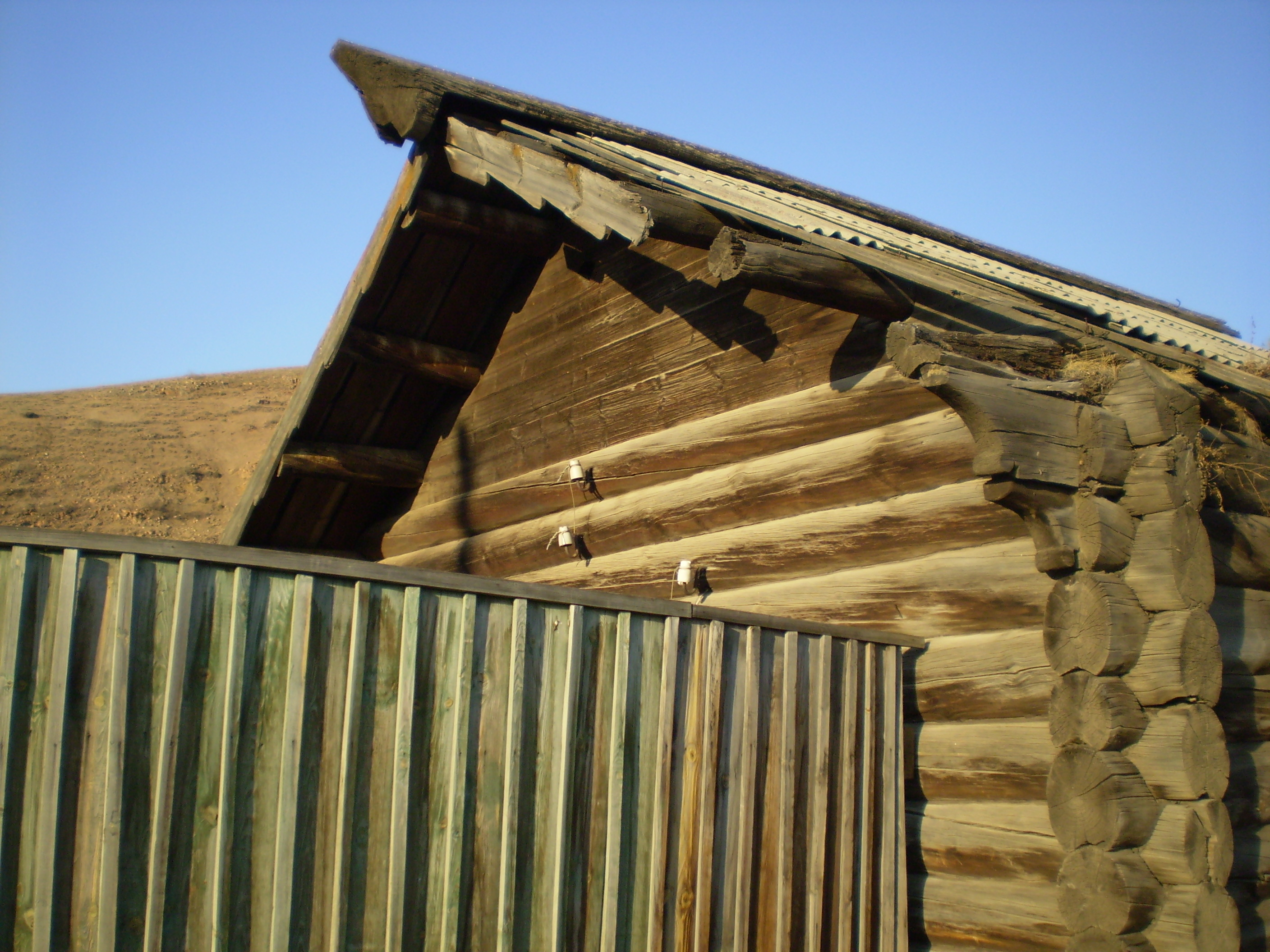 Охлупень на кровле старого дома. Село Десятниково, Тарбагатайский район Бурятии.